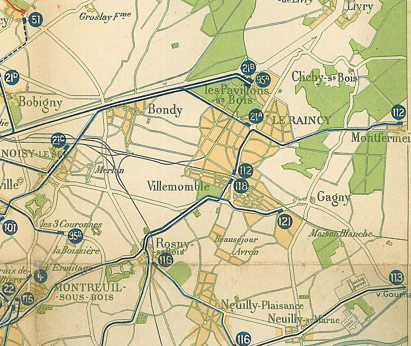 Extrait de la carte, STCRP : Autobus - Tramways - Bateaux : lignes de banlieue Cadrage sur Le Raincy La carte, dressée par H. Barrère et imprimée par l'institut cartographique de Paris, n'est pas datée. Toutefois, l'analyse des tracés des lignes permet de la dater du début 1925